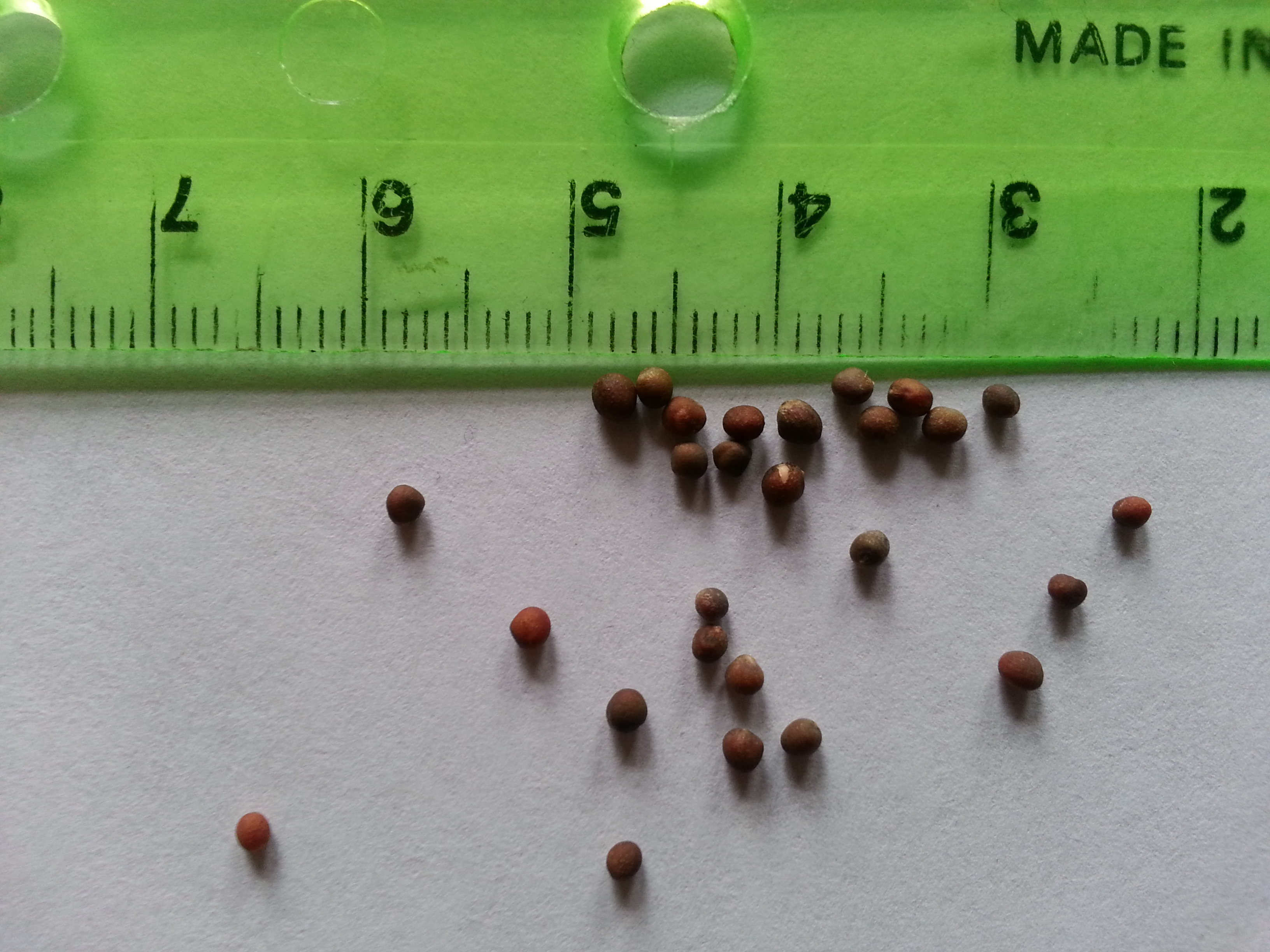 Graines de brocoli. Brassica oleracea var. italica